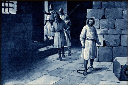 Věnceslav Černý - Soběslav II. vězněn na hradě Přimdě